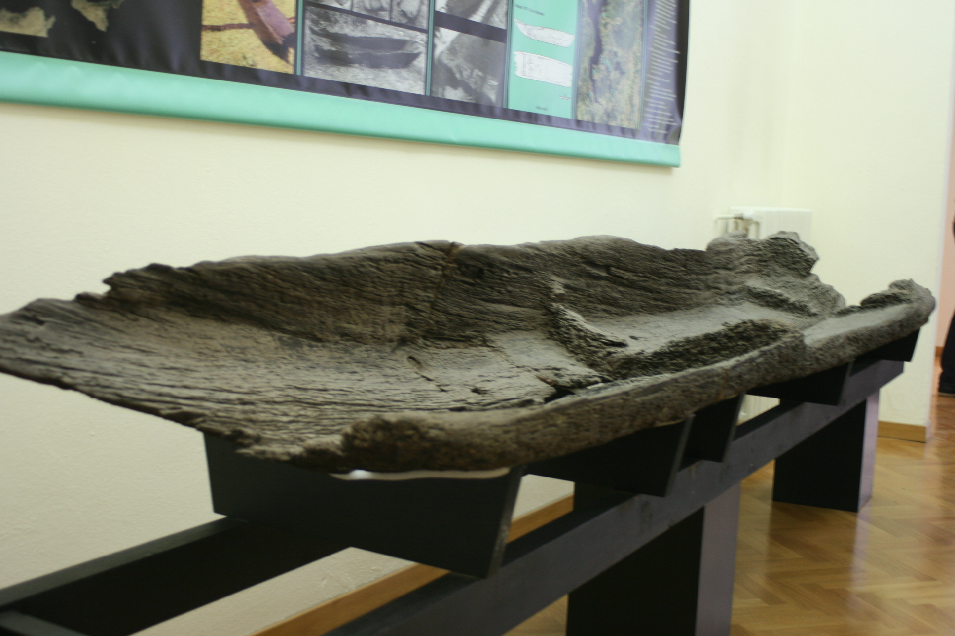 Piroga ritrovata nel lago di Monate nel 1971